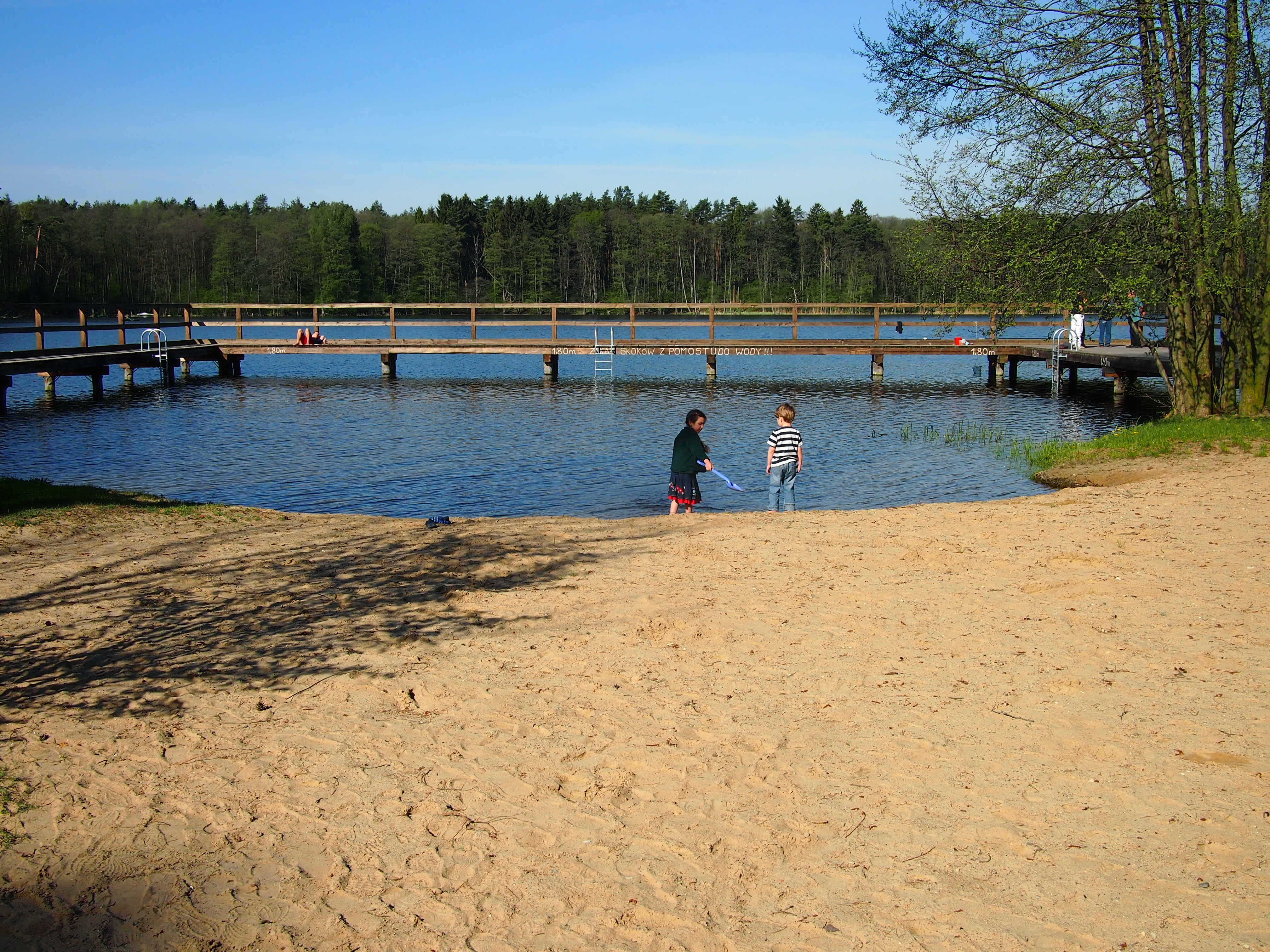 Bachotek Lake, Poland